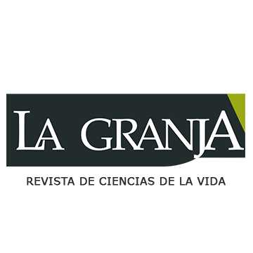 Portada de la revista La Granja